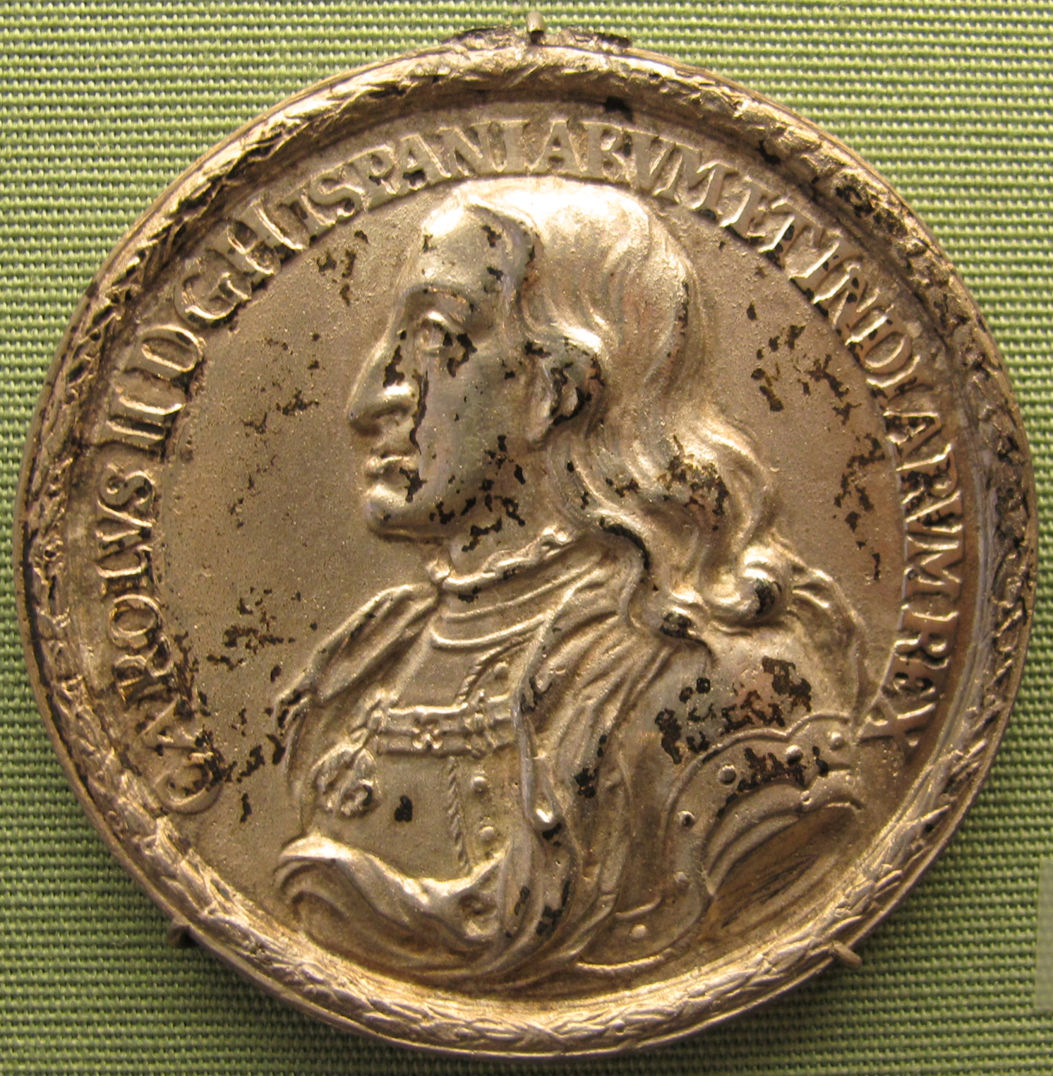 Carlo II di Spagna (1661-1700), argento, 1690-1700 ca